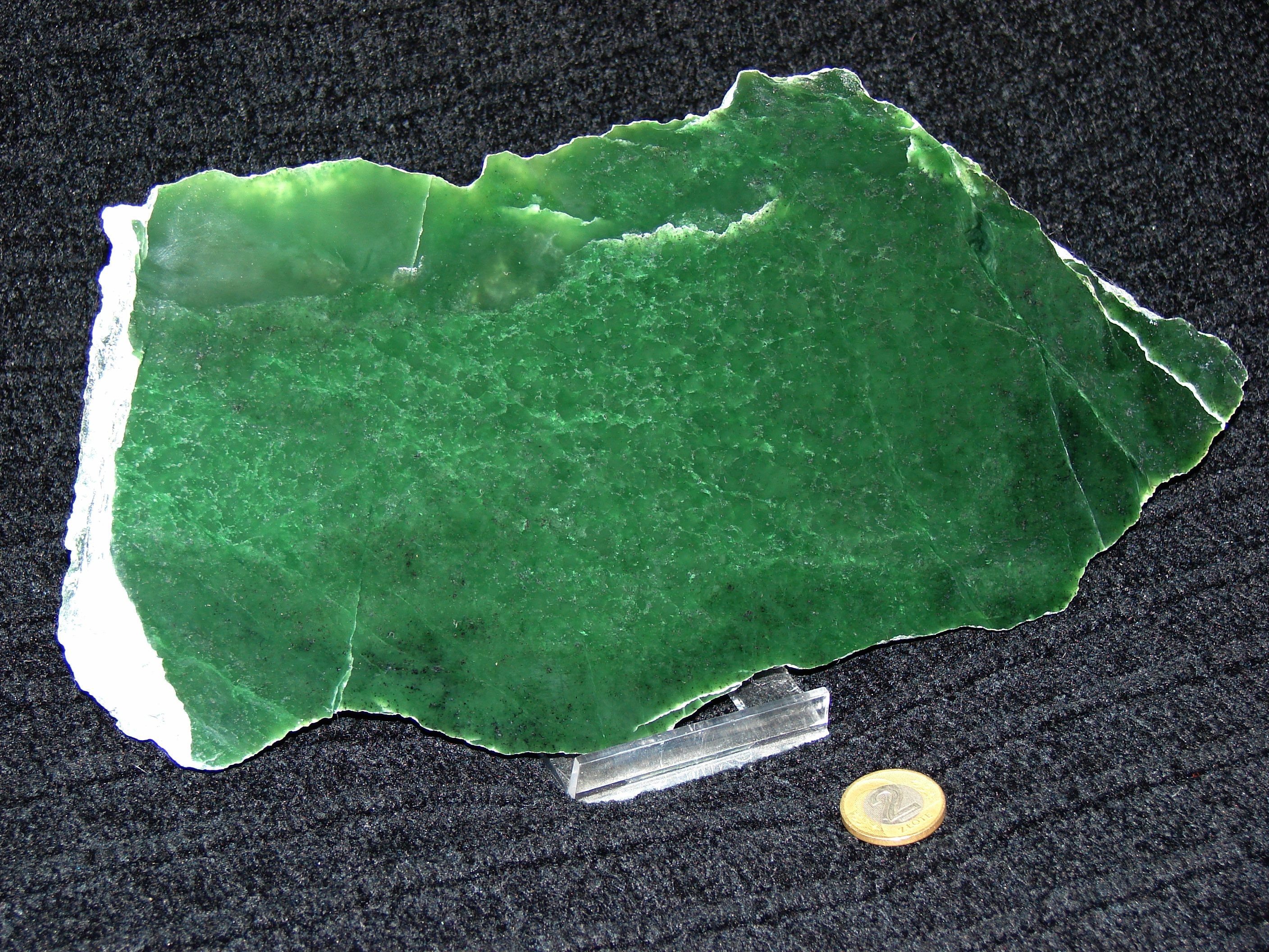 Nefryt, polerowany zgład, Kanada (rejon Lytton)